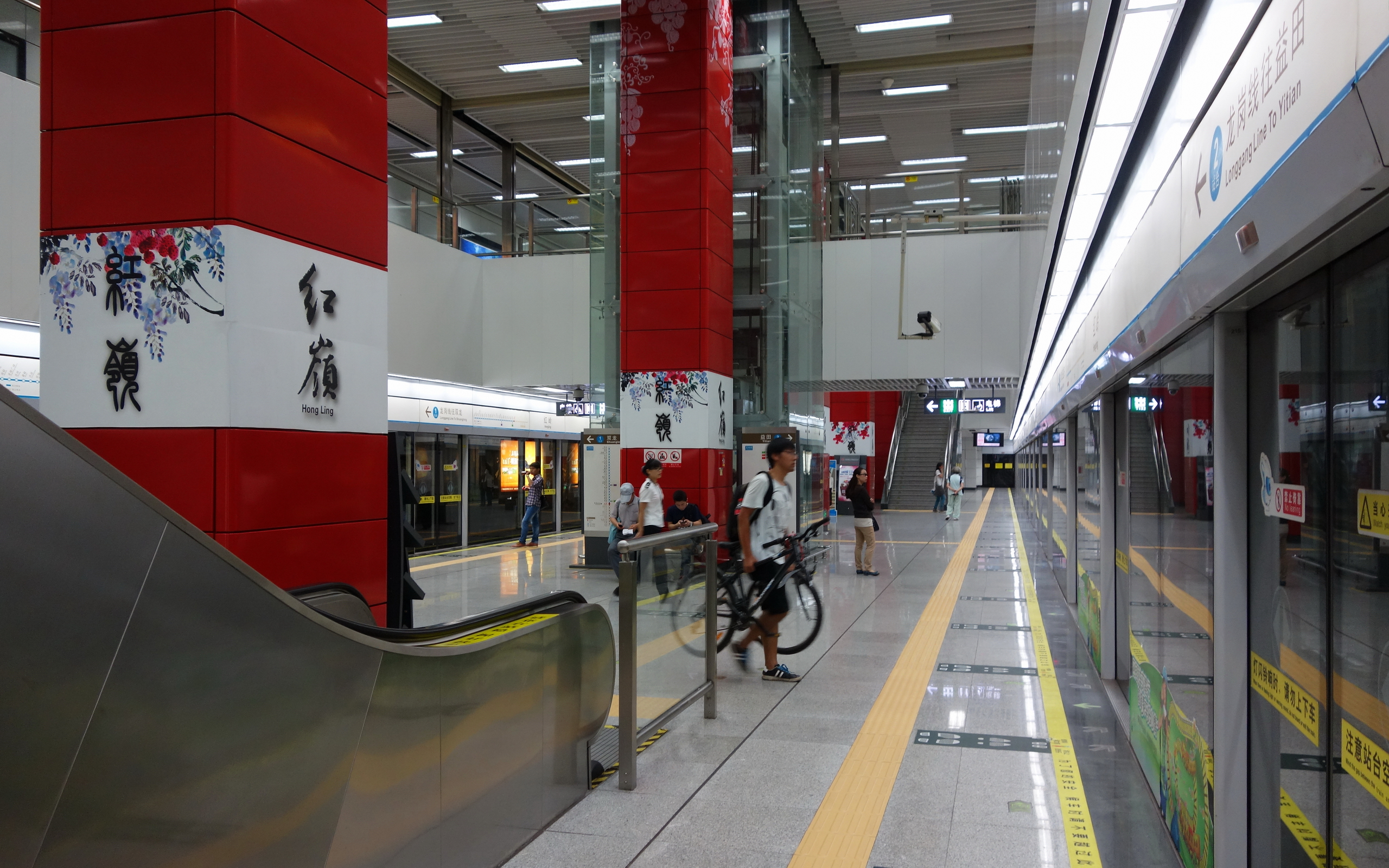 深圳地铁龙岗线红岭车站站台层